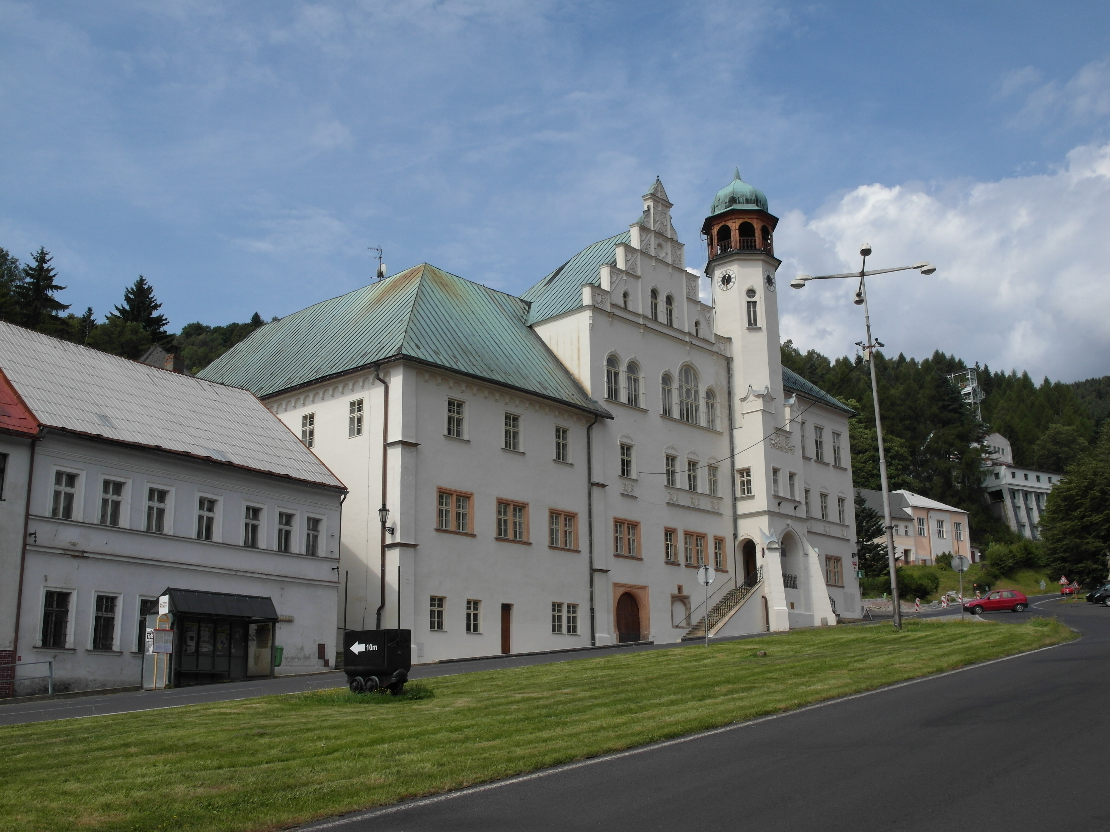 Radnice (Jáchymov), bývalý Šlikův dům, nám. Republiky 1, Jáchymov